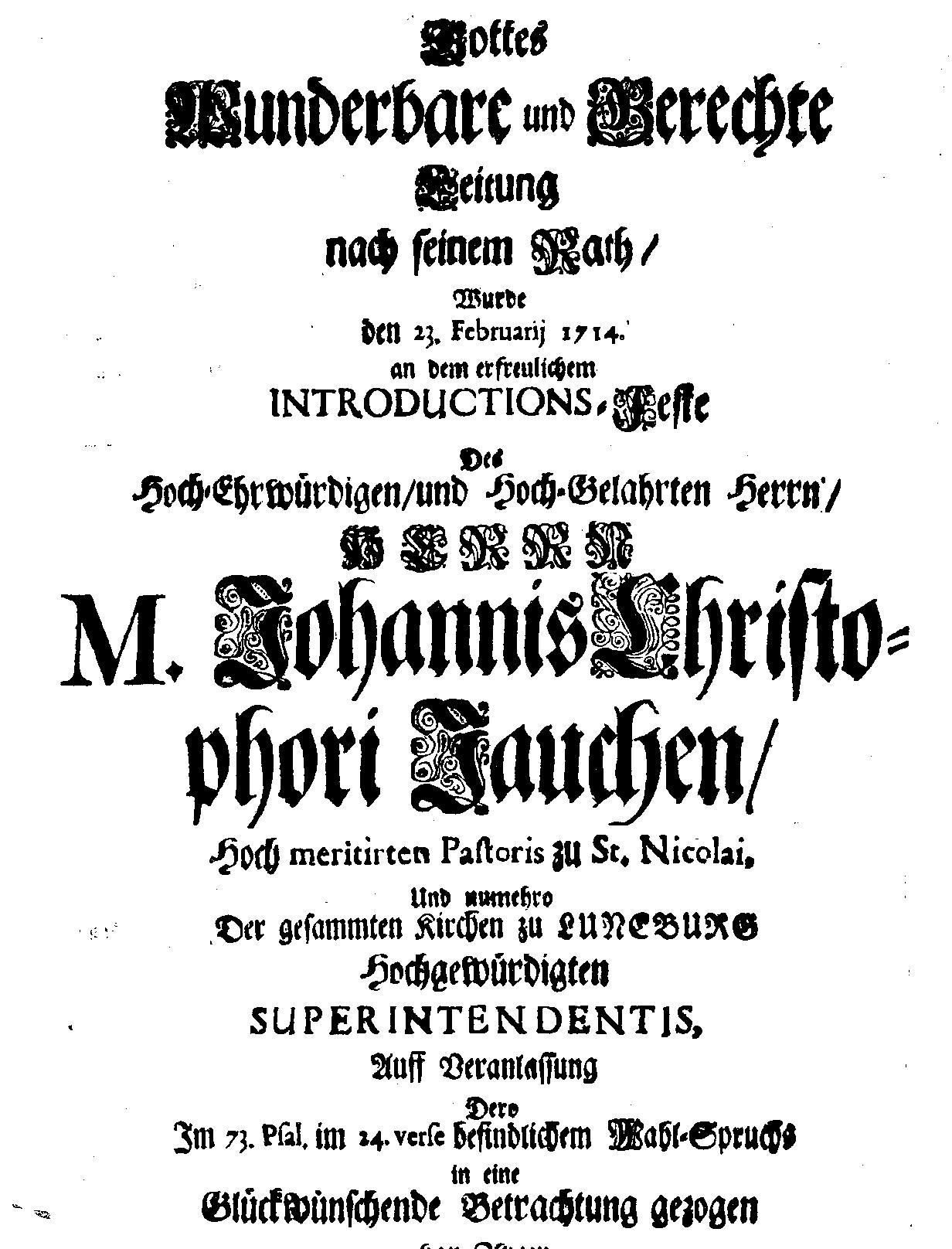 Devise der Jauch (1714) (Devise_der_Jauch.jpg) - Titelblatt einer barocken Festschrift